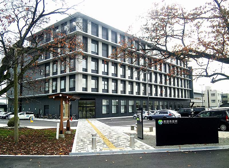 黒部市庁舎（2015年完成）